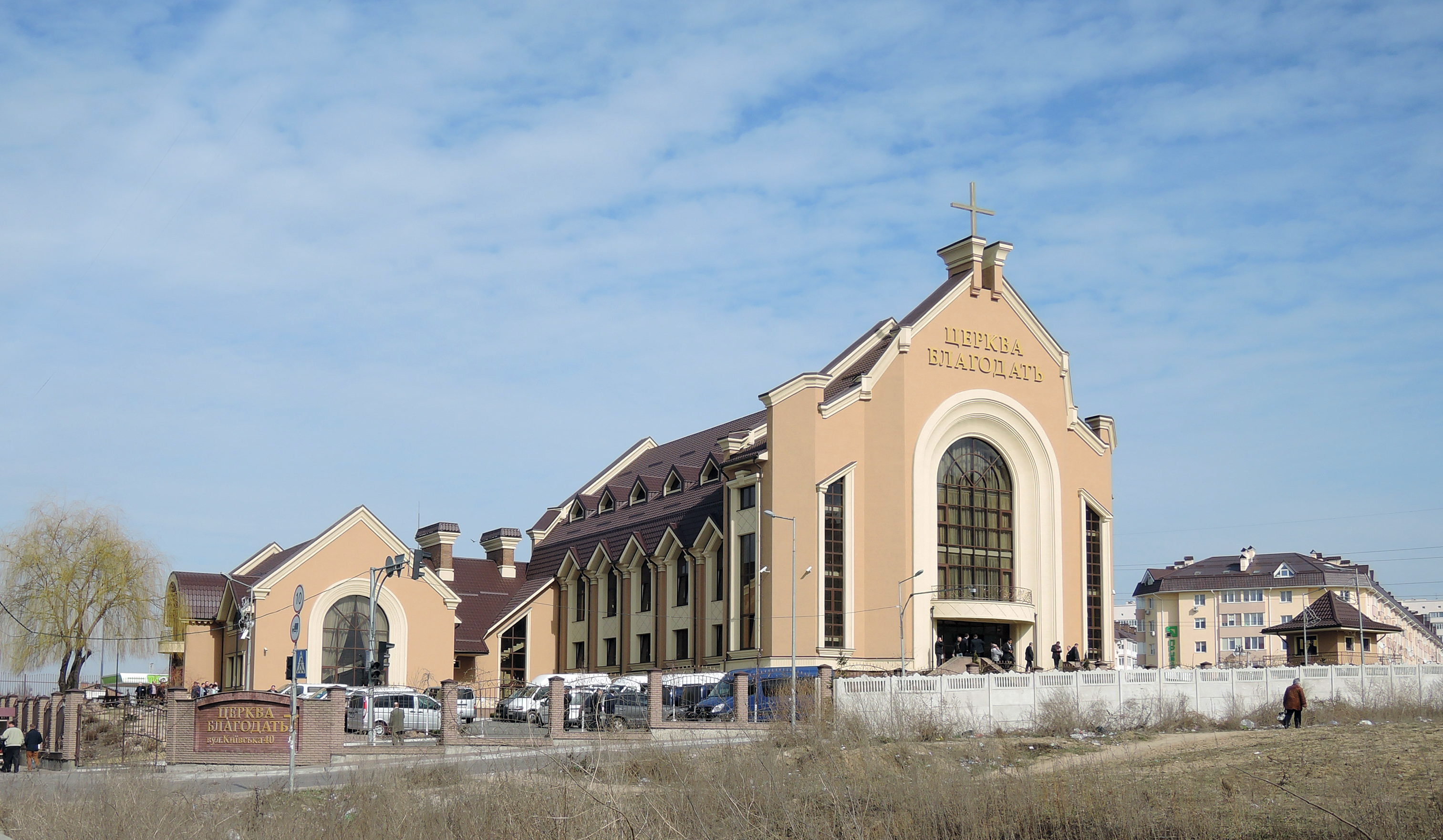 Дім молитви церкви "Благодать", с. Софіївська Борщагівка, біля Києва